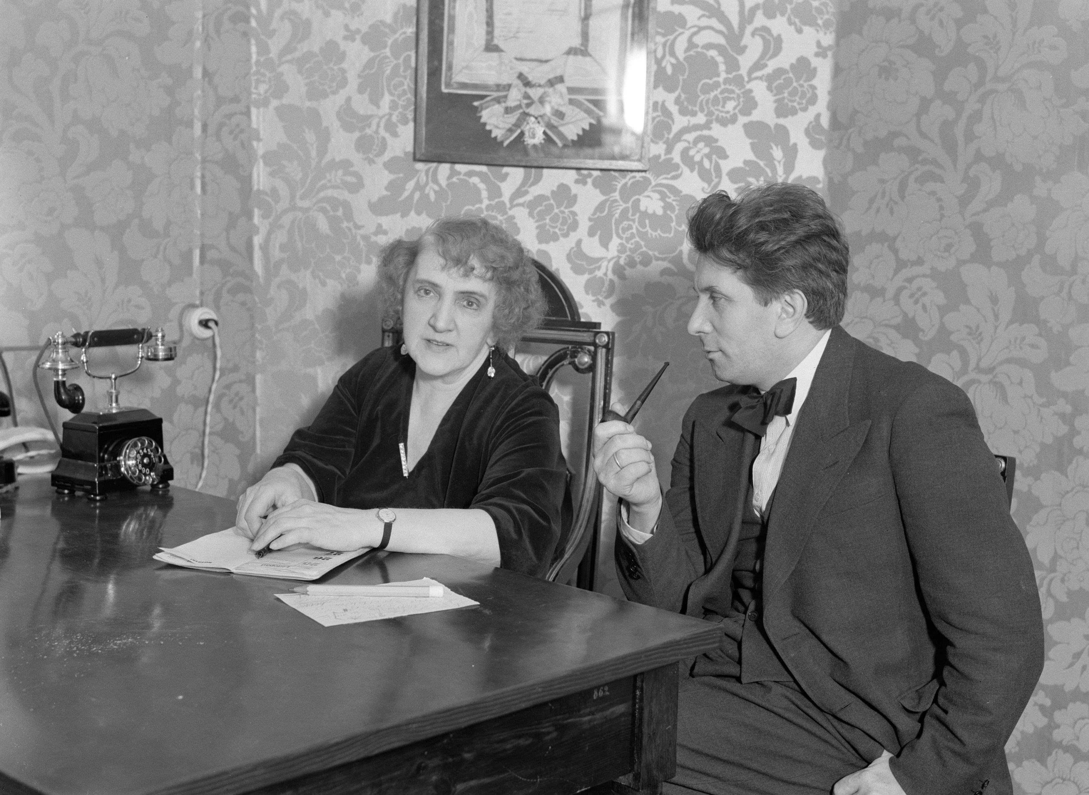 Collectie / Archief : Fotocollectie Van de Poll Reportage / Serie : Reis naar Polen Beschrijving : Janina Korolewicz-Wayda, de directrice van de Warschauer opera, en Adam Dolzycki, eerste dirigent van de opera Datum : 1934 Locatie : Polen, Warschau Trefwoorden : portretten, theater Persoonsnaam : Dolzycki, Adam, Korolewicz-Waydajamina Fotograaf : Poll, Willem van de Auteursrechthebbende : Nationaal Archief Materiaalsoort : Glasnegatief Nummer archiefinventaris : bekijk toegang 2.24.14.02 Bestanddeelnummer : 190-1207